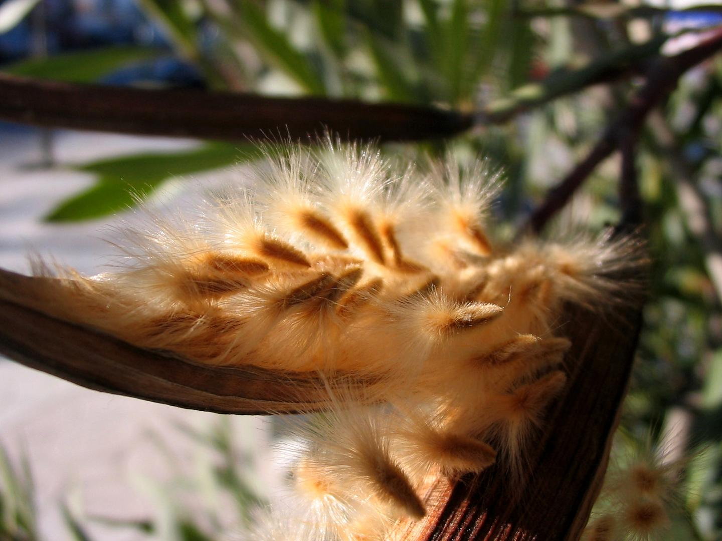 Fotografía digital realizada por Pablo Alberto Salguero Quiles a un ejemplar de Nerium oleander, en español Adelfa, en Madrid (España) en el mes de Diciembre de 2004, el ejemplar se encuentra en un parque y mide unos dos metros. Se aprecia en la foto como salen de la cápsula y el vilano o pelos que las envuelven.